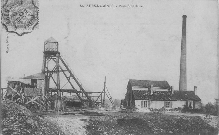 Le puits Sainte-Claire.